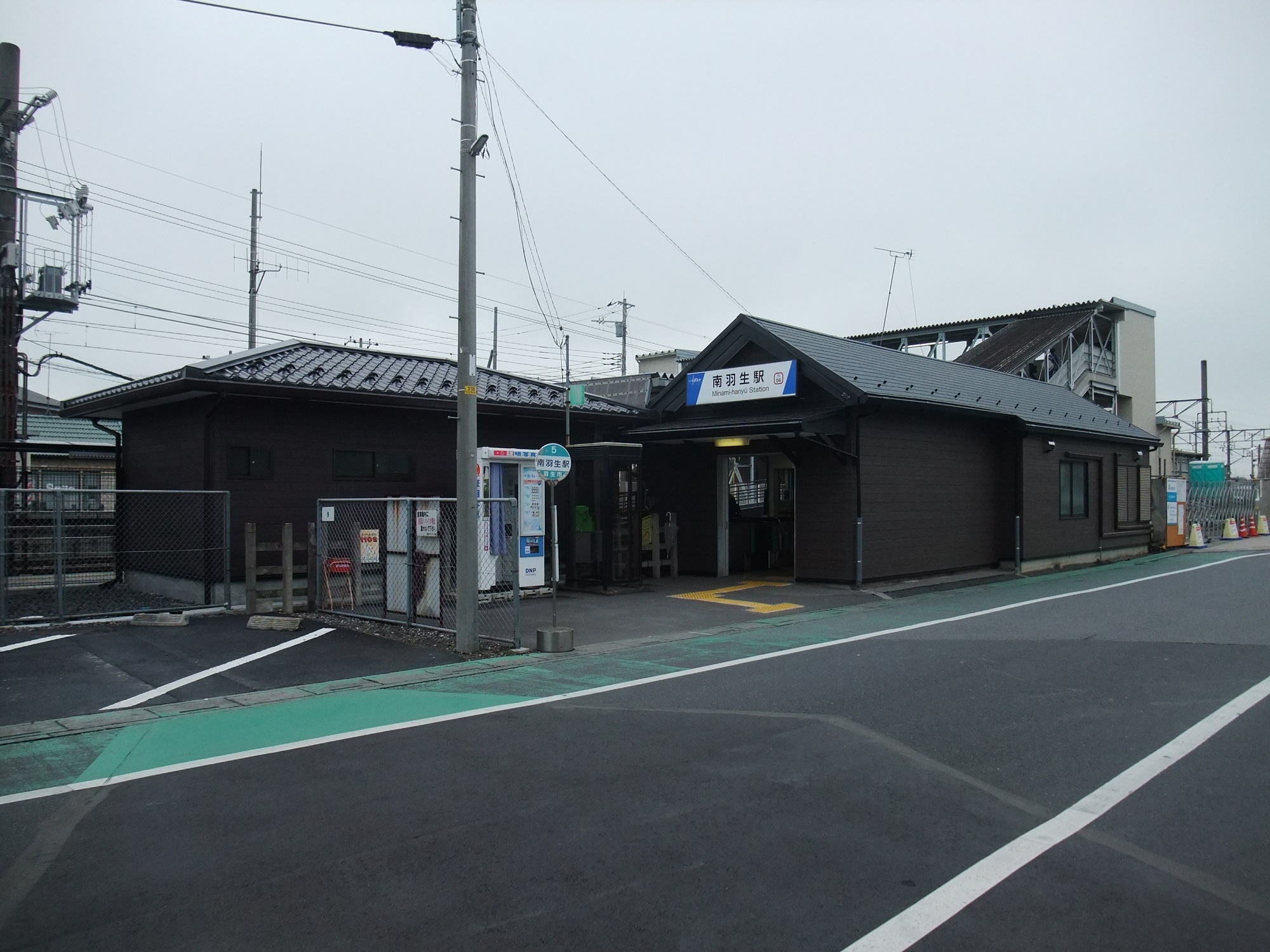 東武伊勢崎線南羽生駅